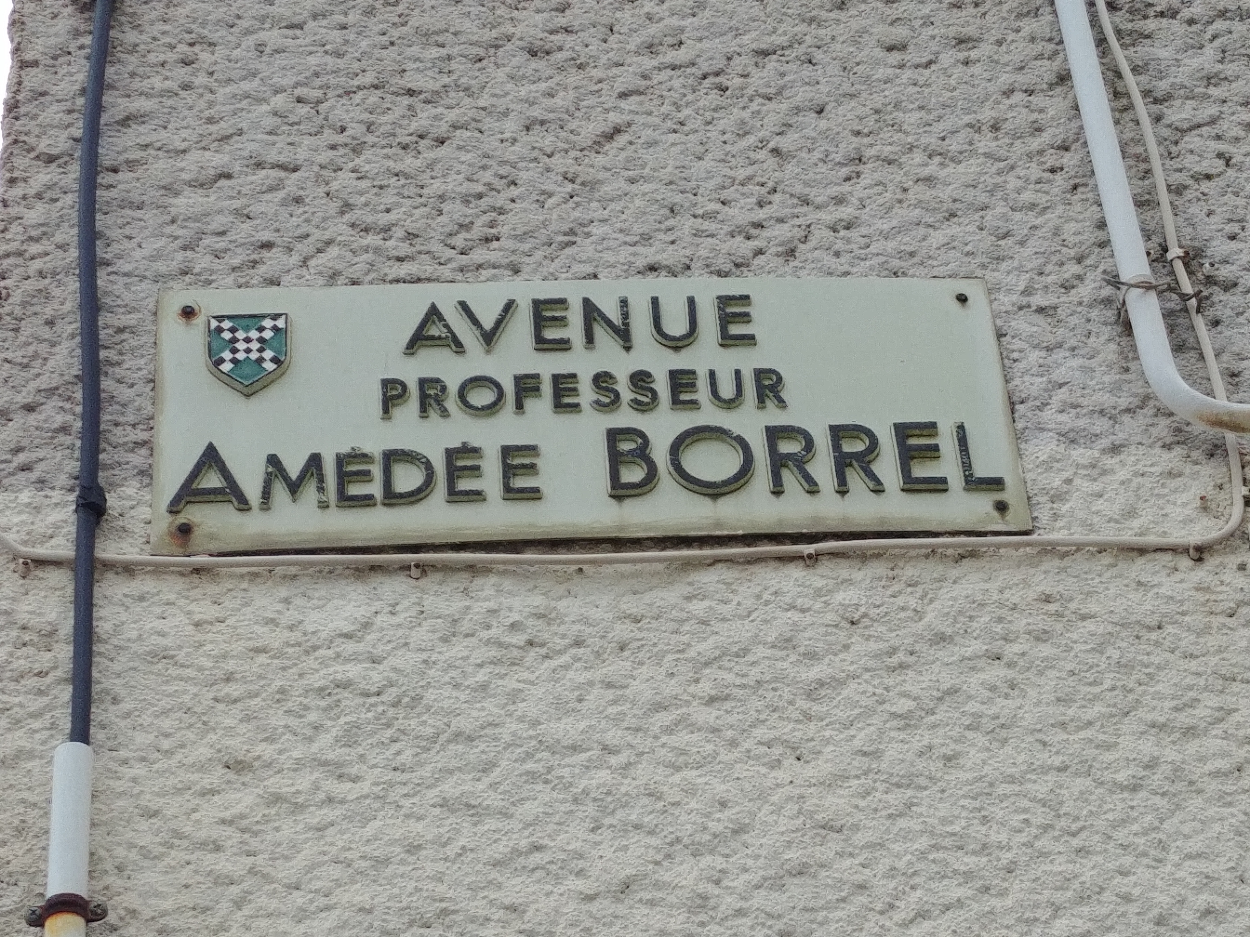 Rue AmédéecBorrel á Cazouls lès Béziers.